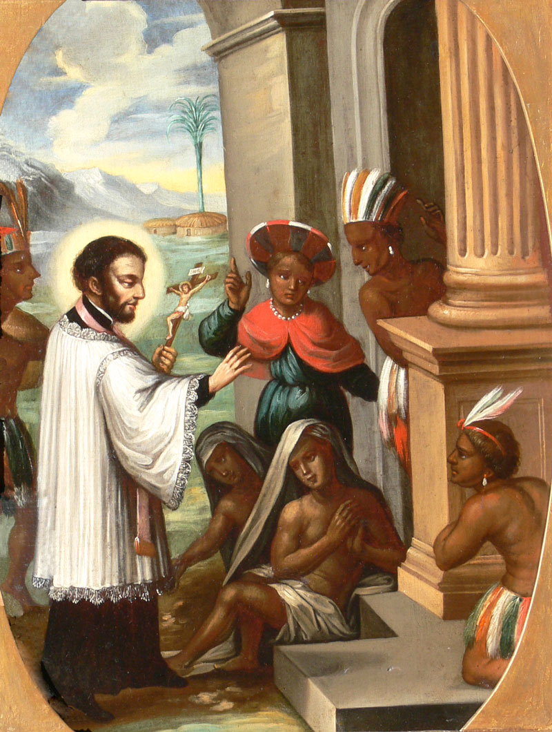 Der hl. Franz von Xaver tauft Heiden (?), Öl auf Leinwand, ca. 57 cm x 40 cm